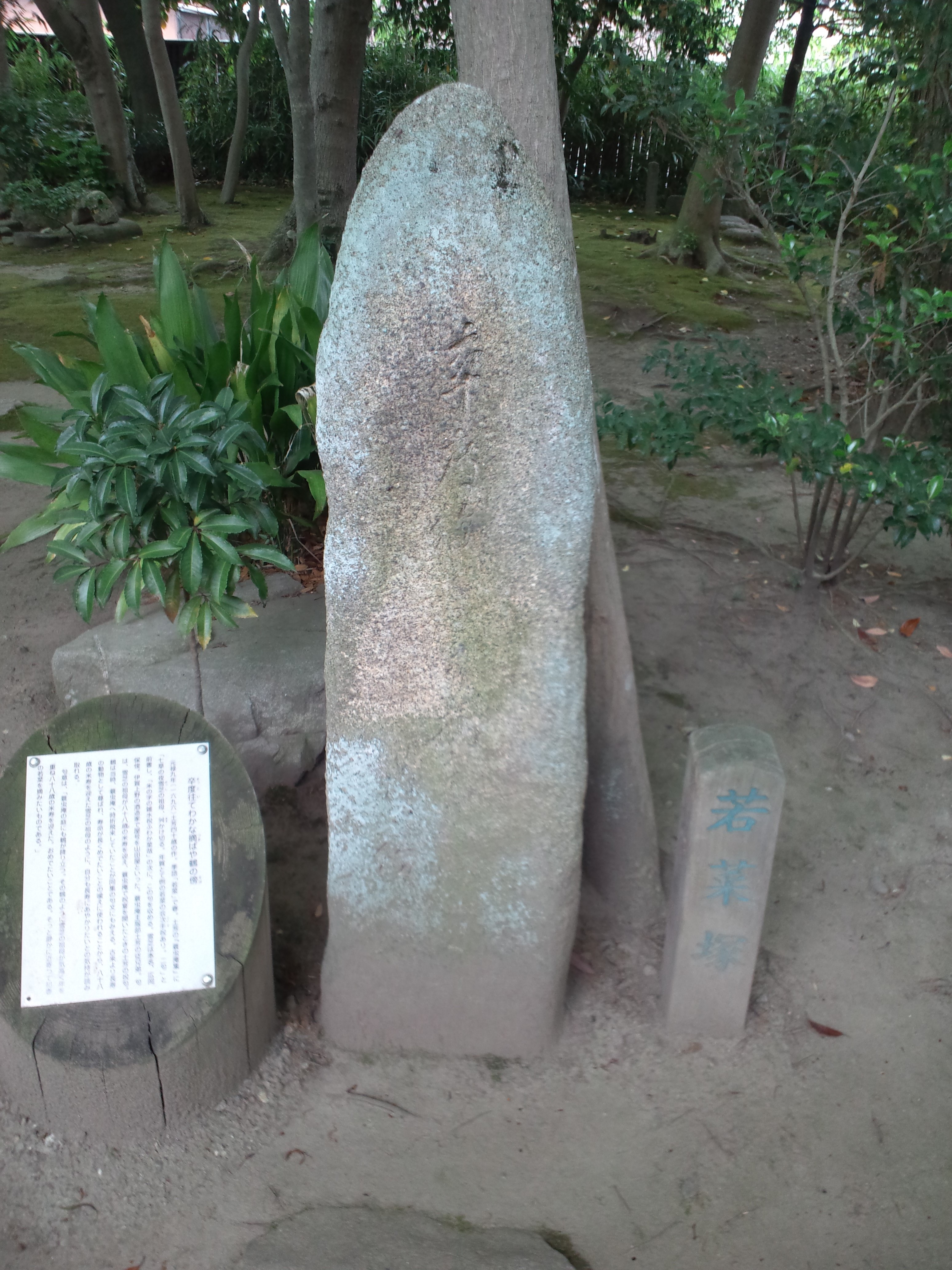 蓑虫庵（みのむしあん・さちゅうあん） 土芳句碑「若菜塚」